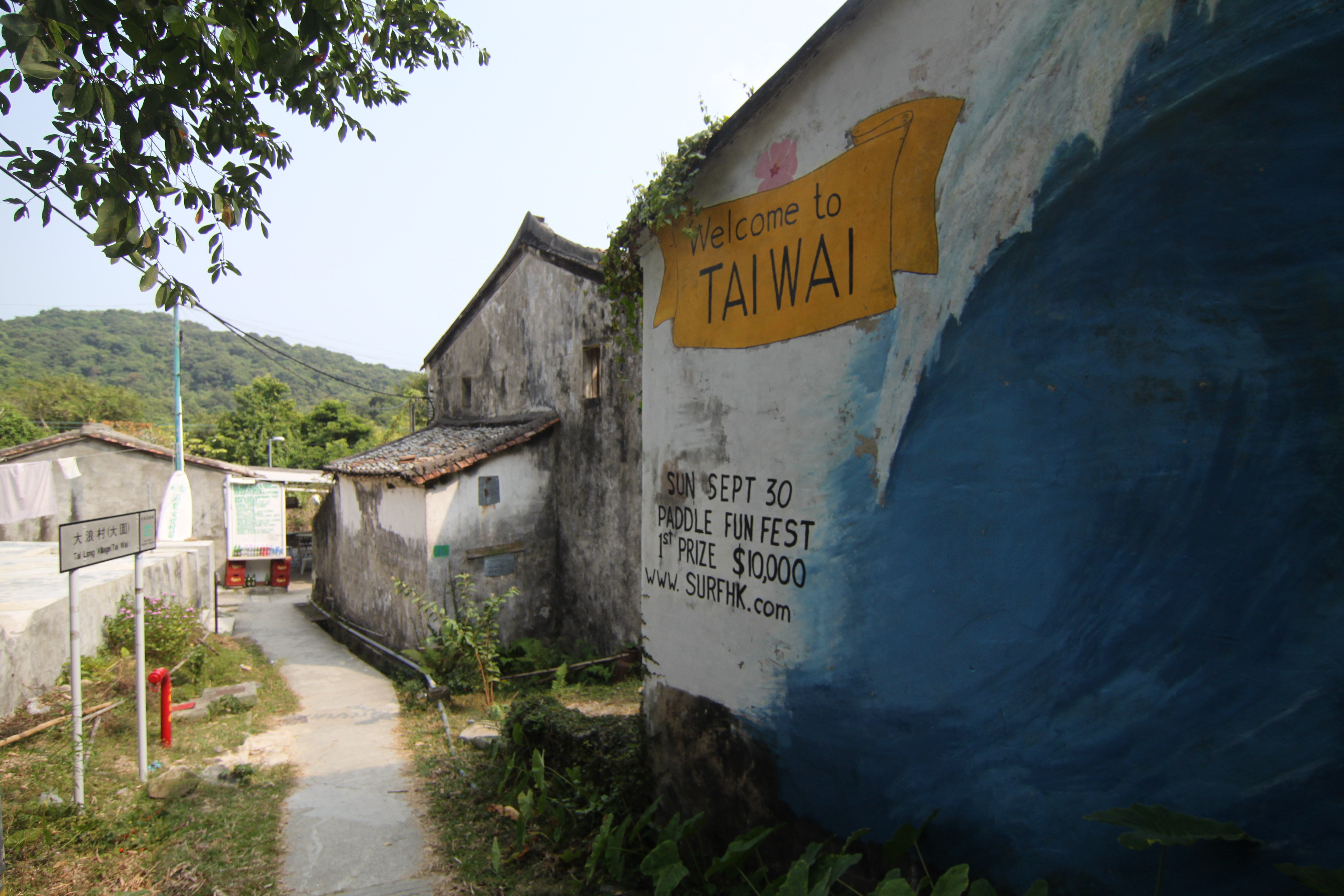 西貢大浪村